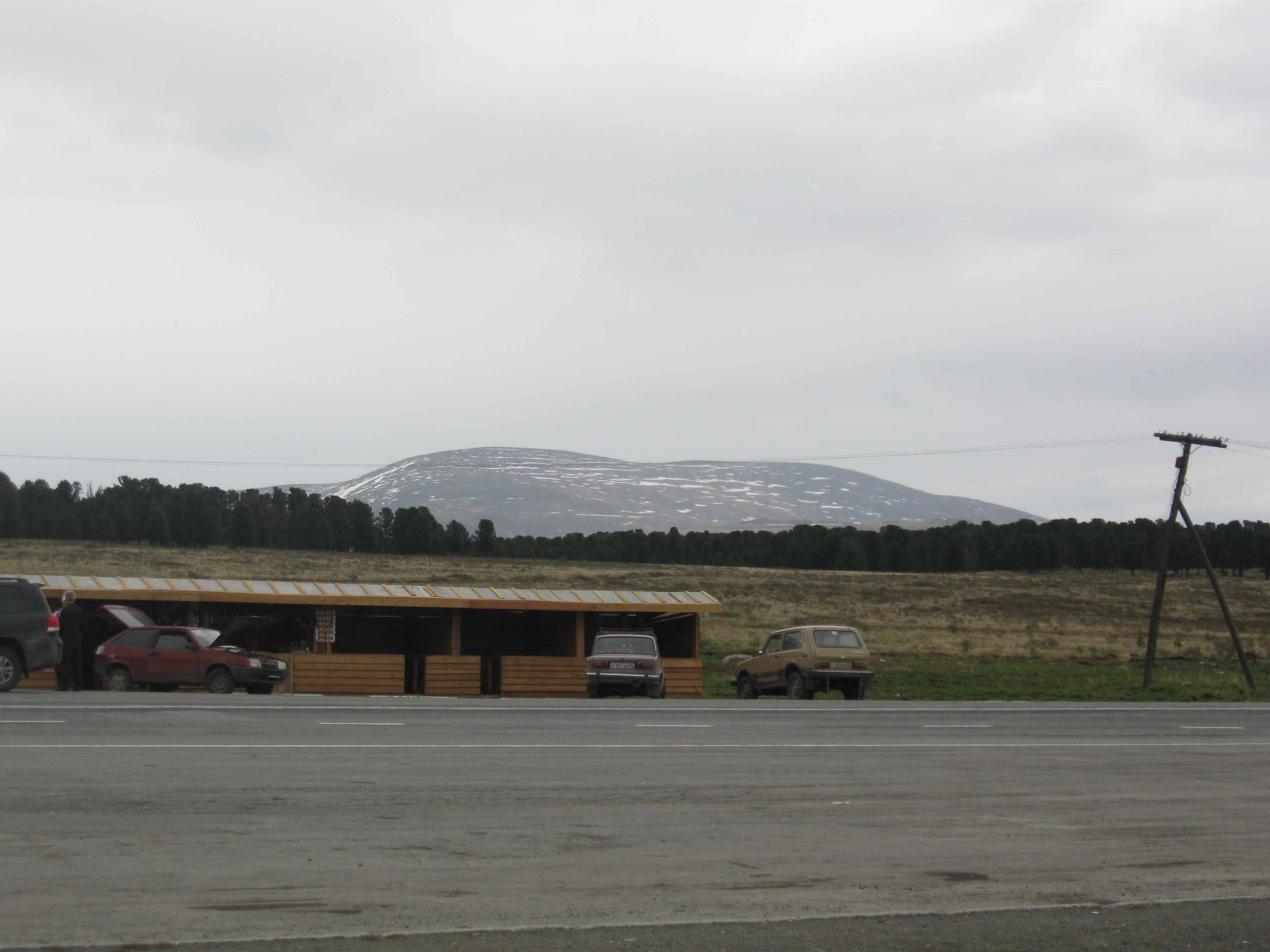 На Семинском перевале, вид на гору Сарлык